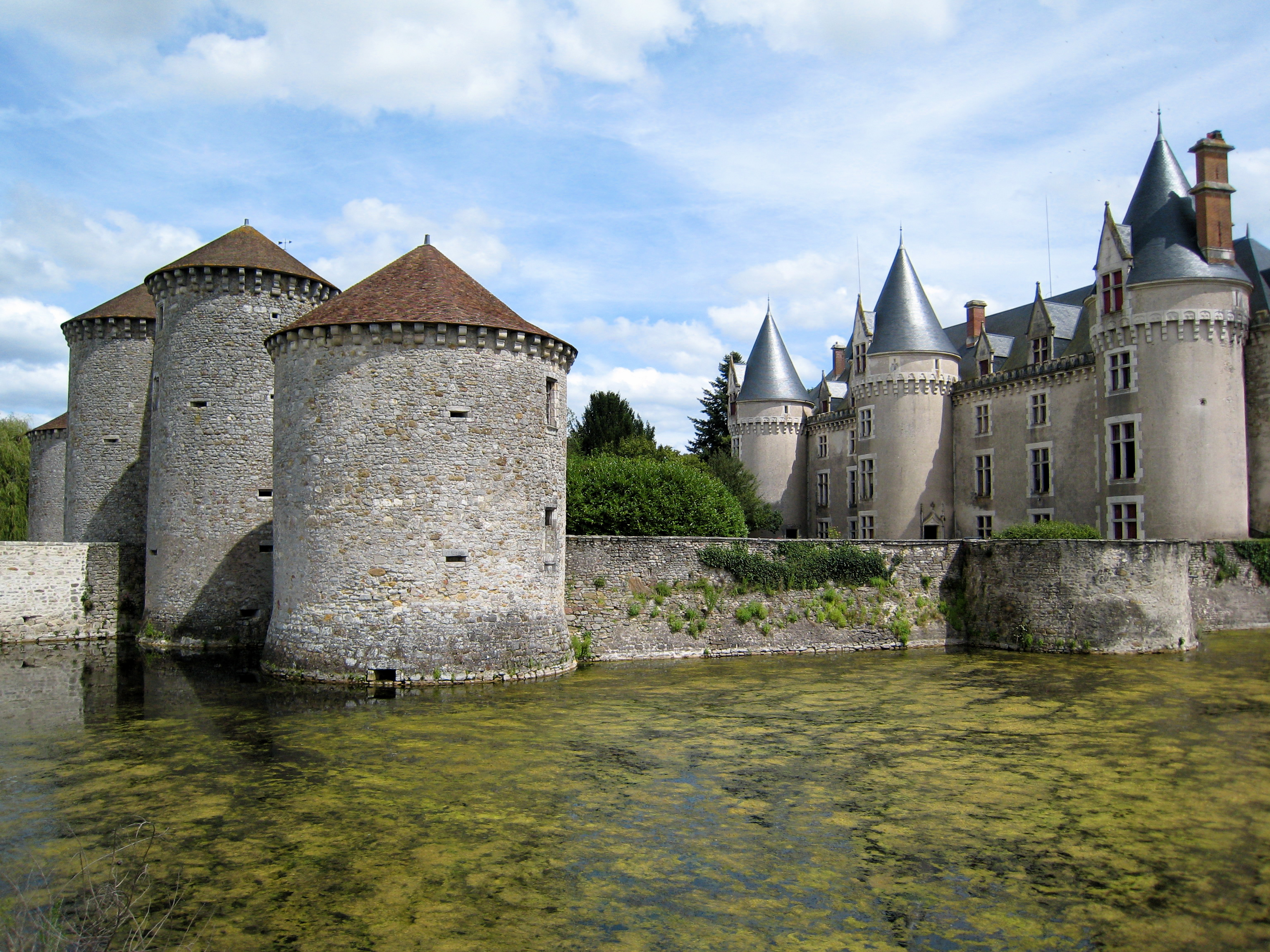 Chateau de Bourg-Archambault, Vienne, France